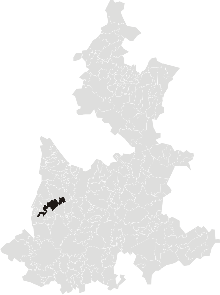 Localización del municipio de Huaquechula en el estado de Puebla (México)